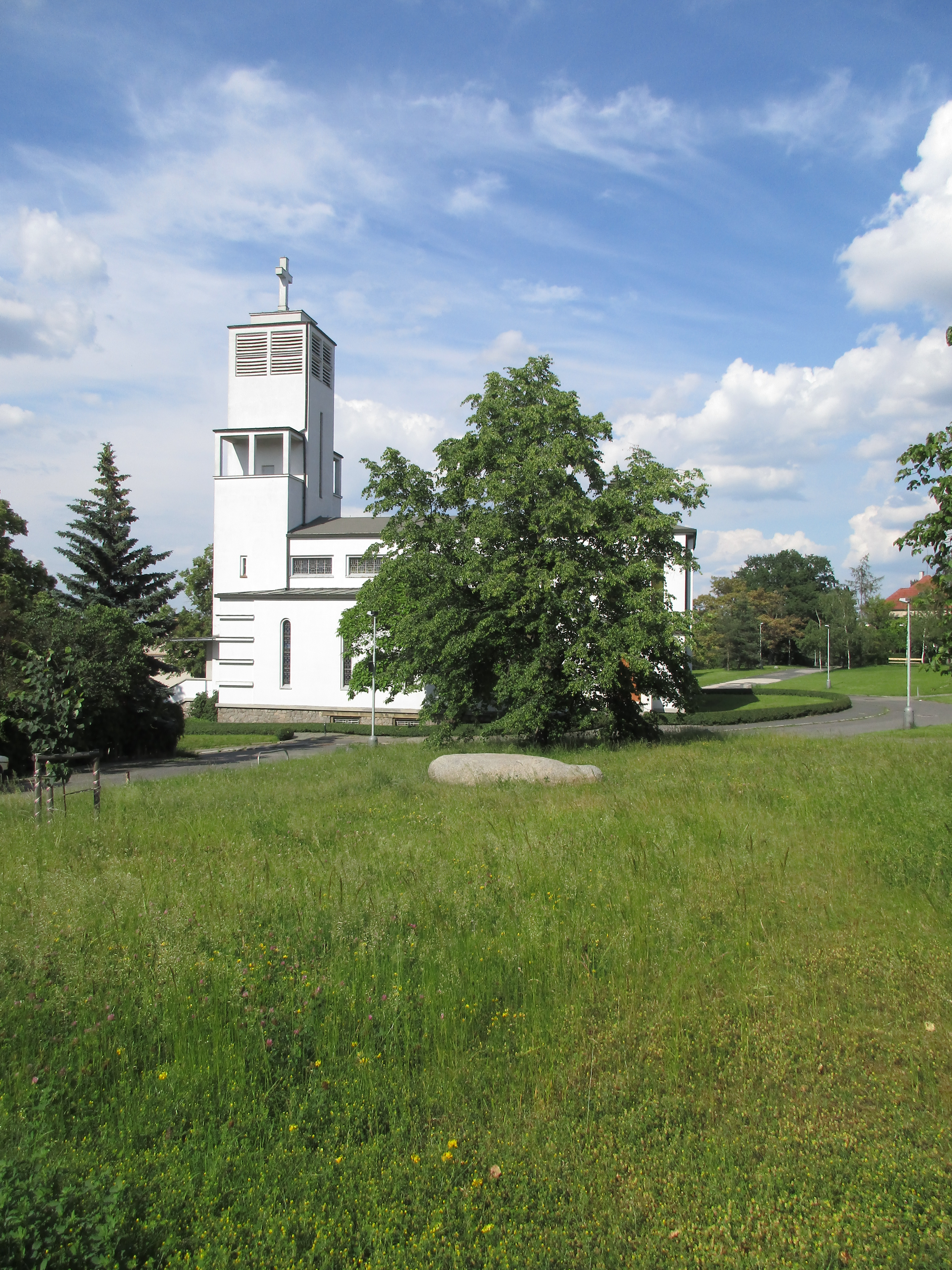 Lípa republiky. Praha 10 - Záběhlice, Spořilov, ulice Jižní X. Vysazena 19. listopadu 1968 na památku 50. výročí vzniku Československé republiky. Před lípou je umístěn kámen s pamětní deskou a vlevo lípa nově zasazená 28. října 2018 ke 100. výročí republiky a označená trikolorou.